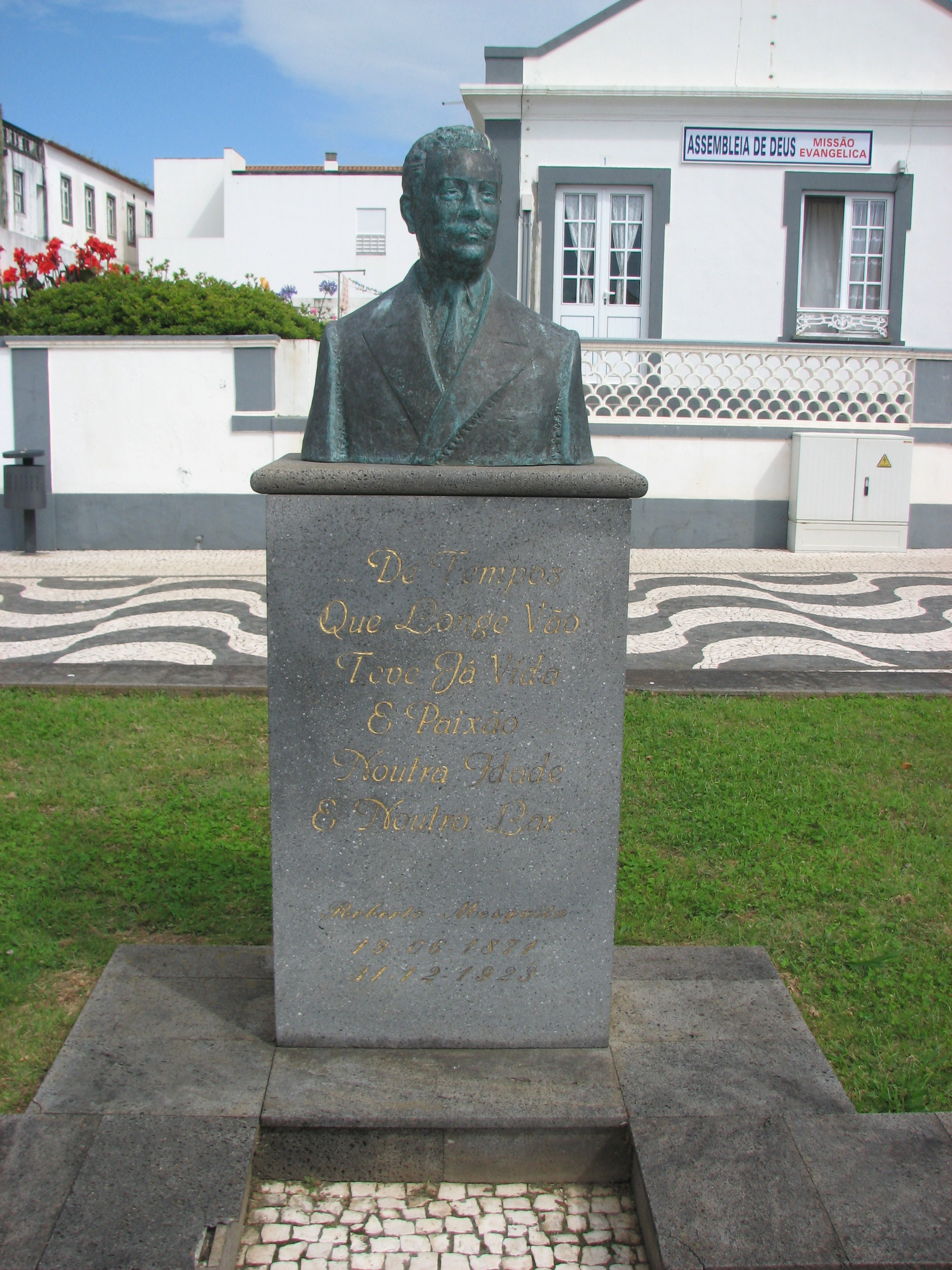 Monumento to the Azorean poet Roberto de Mesquita, Santa Cruz das Flores, Azores.